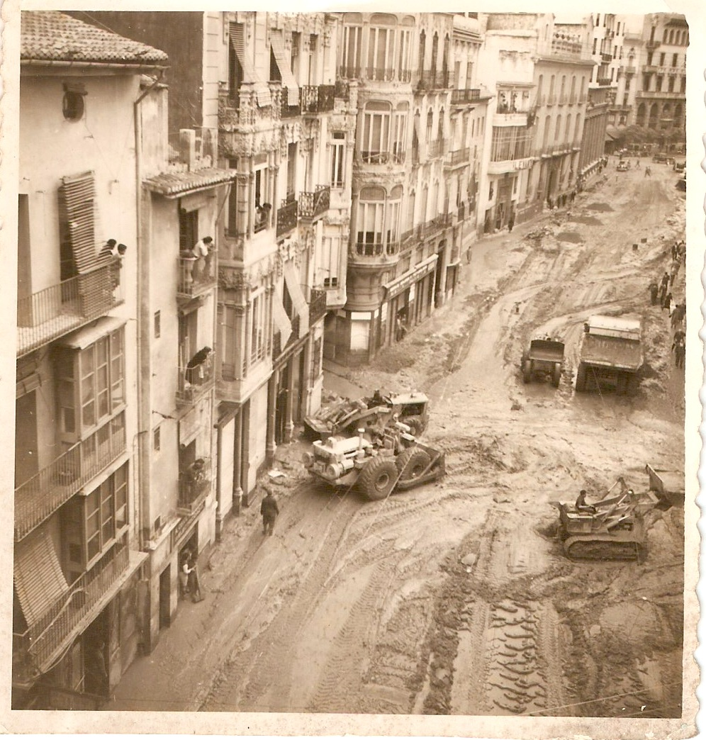 Riada del 57. Maquinaria limpiando la calle del Pintor Sorolla.